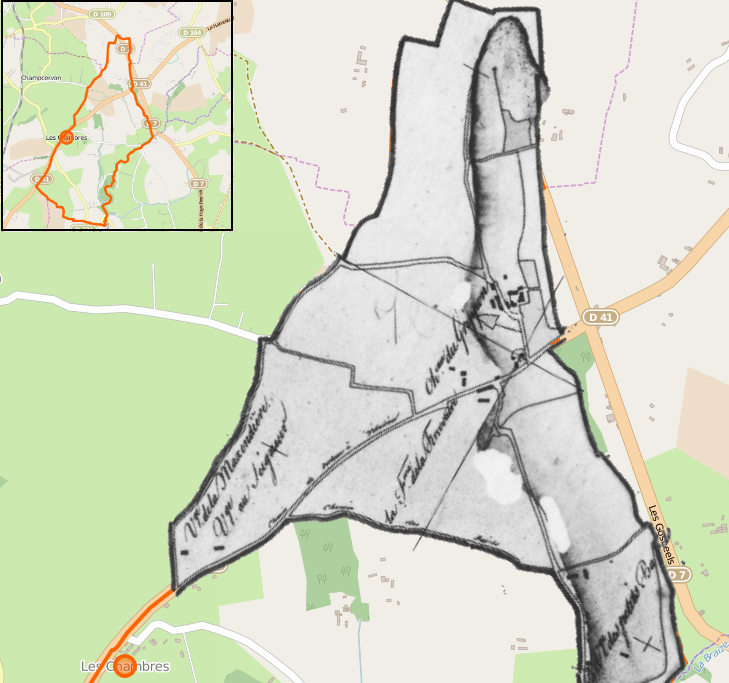 Plan cadastral du Grippon sur fond Openstreetmap de la commune des Chambres